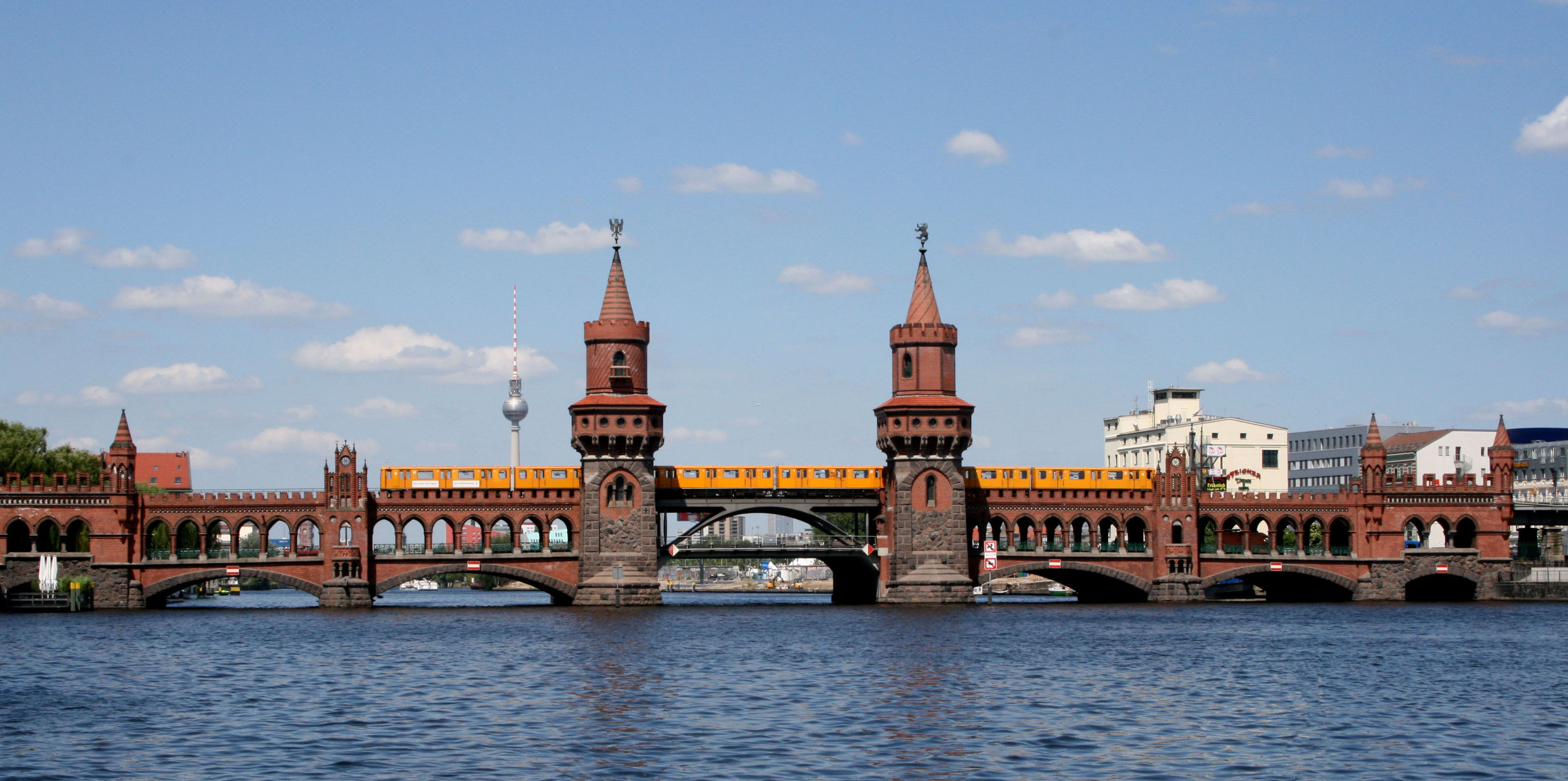 Berlin, Oberbaumbrücke mit U-Bahnzug